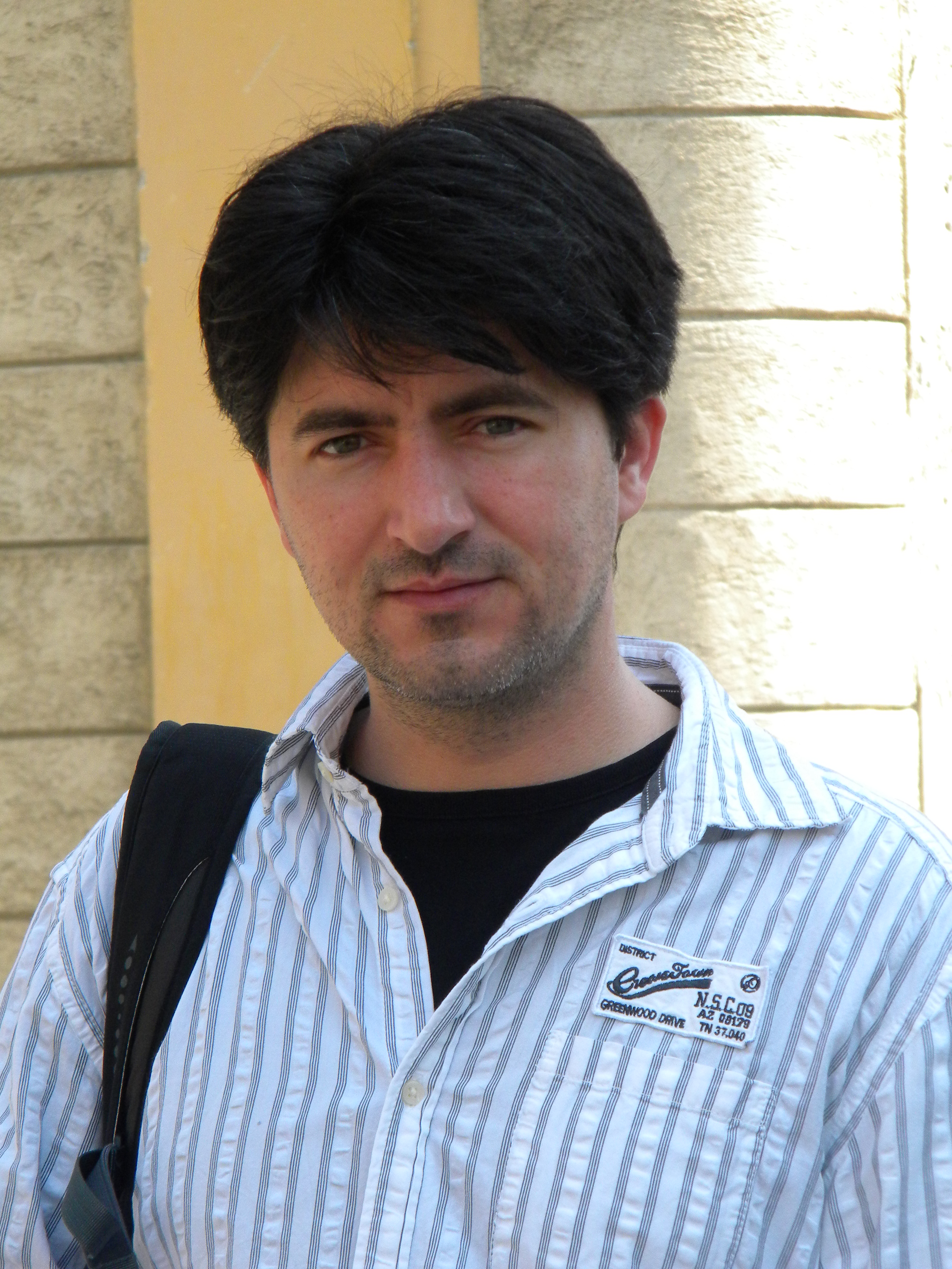 Keresztes Attila rendező a Szatmárnémeti Északi Színház előtt